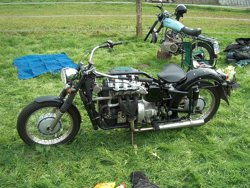 Johnny Flataus "Speed-Triple" und Reinhard Hötgers "Flitzibitz" (mit Reifenpanne) auf dem 5. internationalen Dieselmotorradtreffen in Hamm 2005 eigenes Photo Johnny Flataus "Speed-Triple" and Reinhard Hötgers "Flitzibitz" (with flat tire) at 5th international Dieselmotorcycle Rally 2005, Hamm, Germany self taken photo